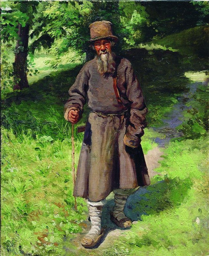 Ярошенко Николай Александрович. «Крестьянин в лесу» 1880